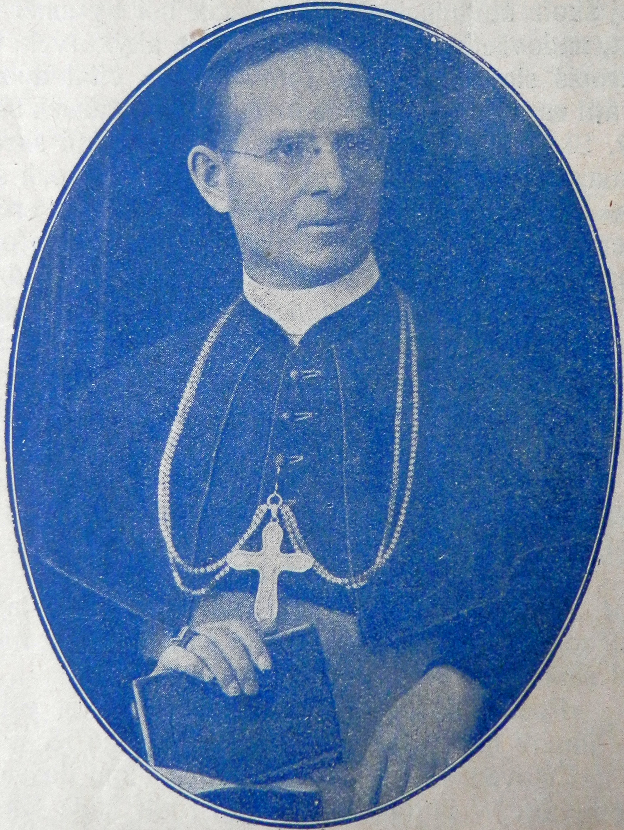 Digitalizované foto z časopisu Posol Božského Srdca Ježišovho, vydaného jezuitmi v roku 1942 pri príležitosti 45. výročia založenia časopisu (1897). Slovensko.